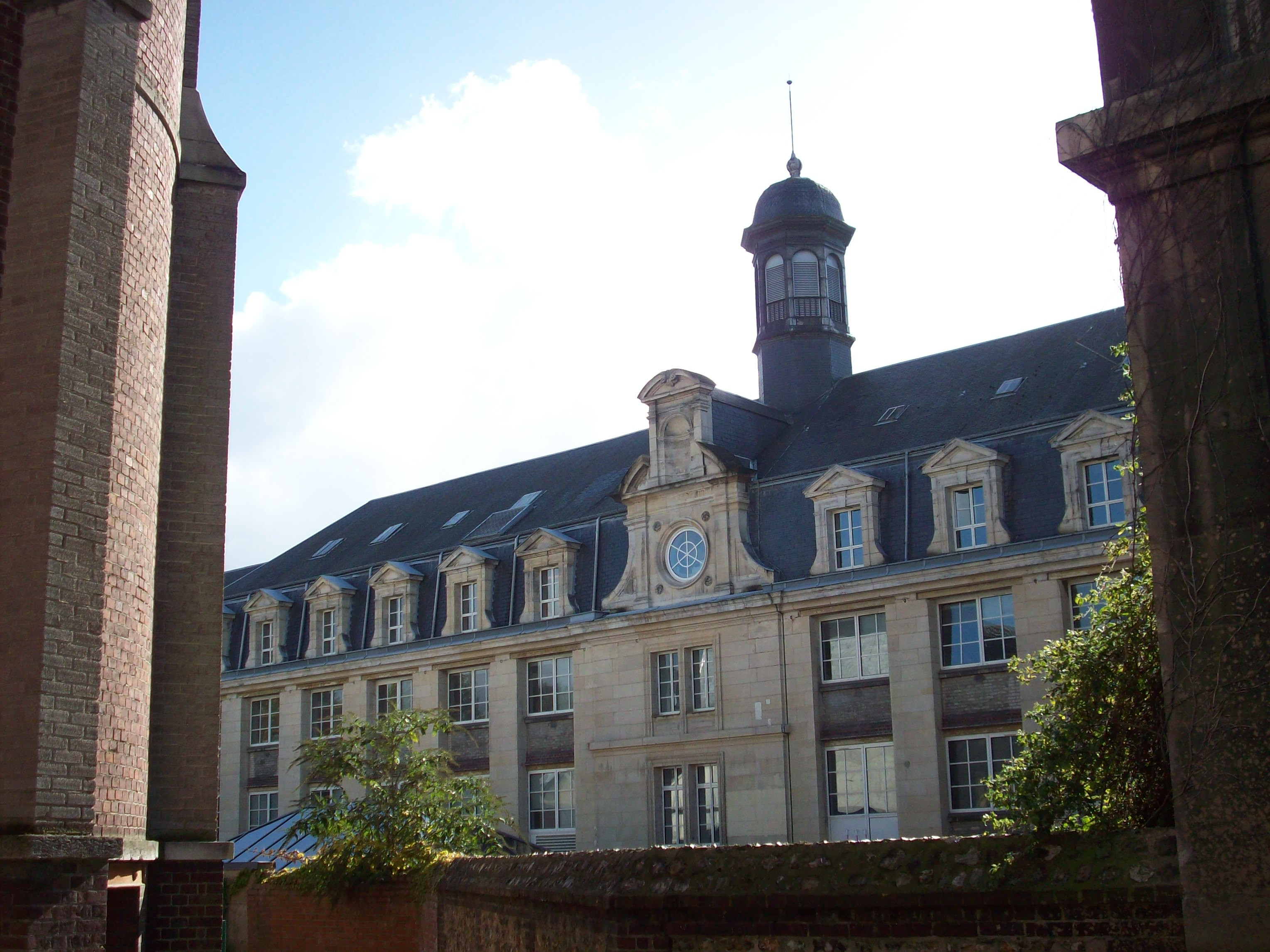 Ancien séminaire Saint-Nicaise, aujourd'hui collège Fontenelle, à Rouen.